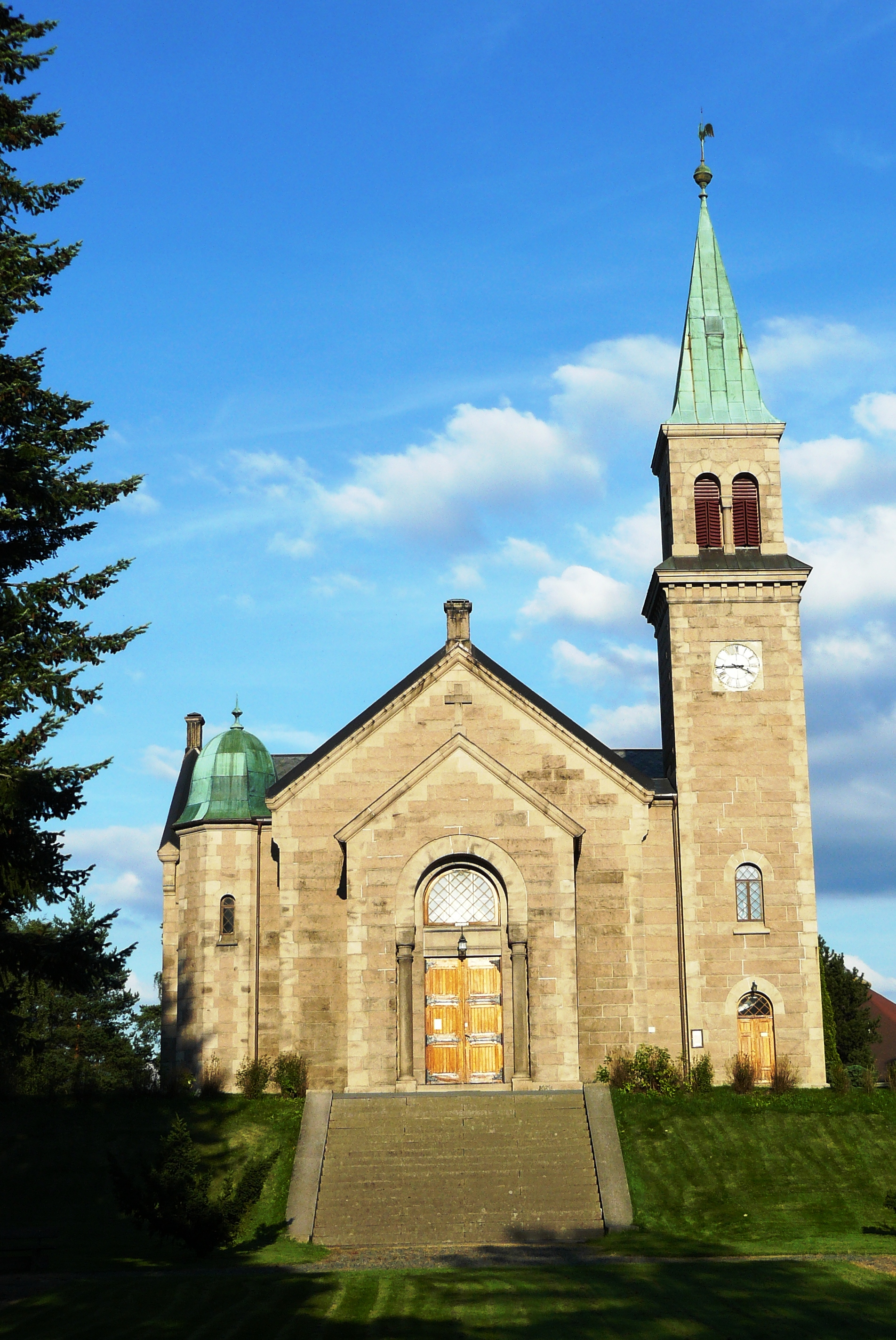 Grorud church, Oslo